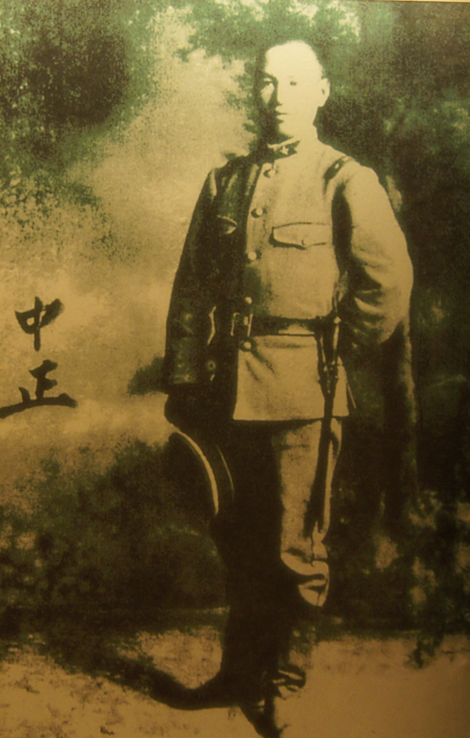 1911年，蒋介石24岁时在日本军校留学时所摄。此图片应属于公共领域。 In the year of 1911, Chiang Kai-sheck, aged 24, as a student at a military school in Japan. This picture should be in public domain.